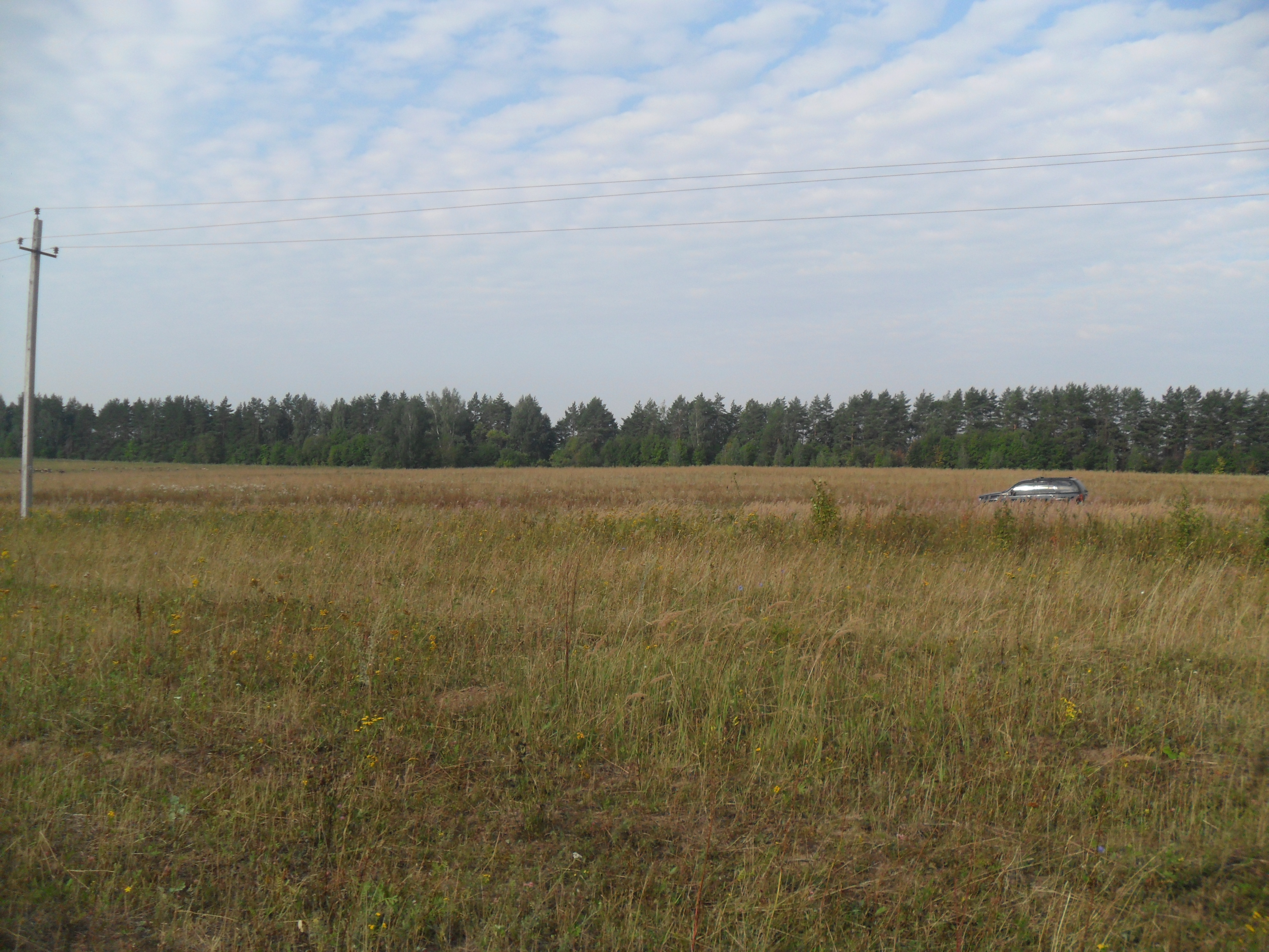 Поле в Веневском районе рядом с Аксиньино.